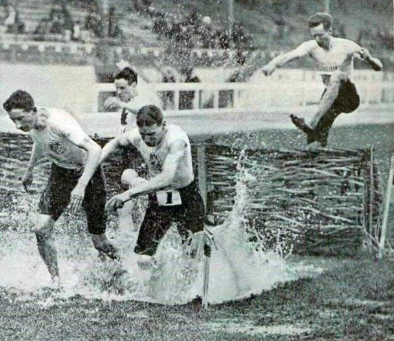 Finale du 3000 mètres steeple aux JO de Londres en 1908.